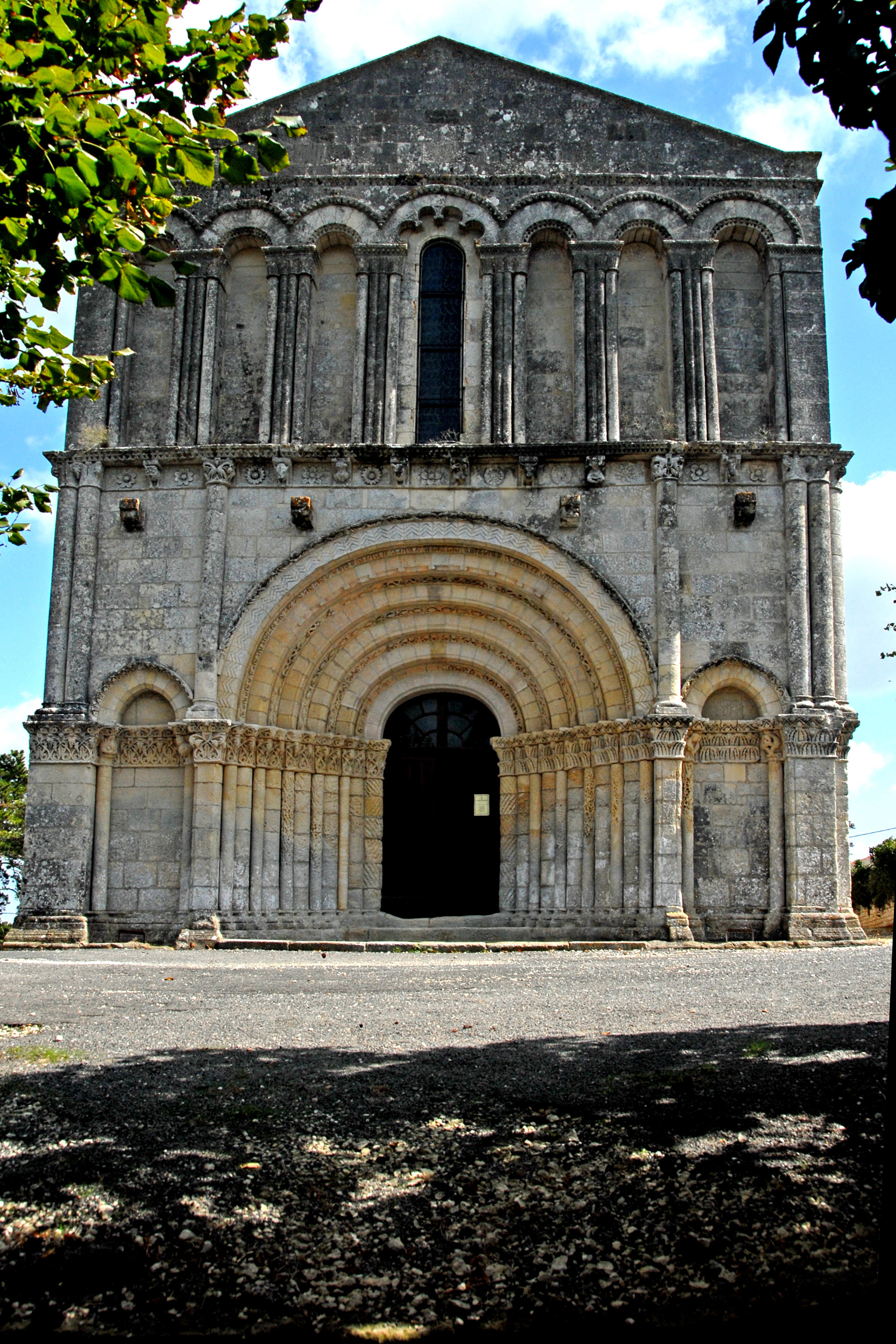 Echebrune, St.-Pierre, Westfassade, gesamt